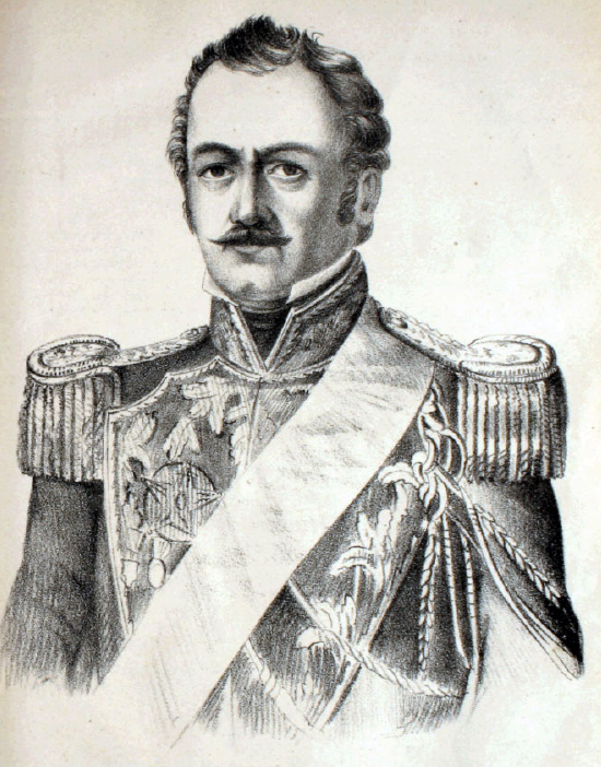 Ramón Freire Serrano (*Santiago, 27 de noviembre de 1787 - † 9 de diciembre de 1851) fue un militar y dirigente chileno que combatió durante la guerra de independencia de su país, hasta alcanzar el grado de Capitán General. Se desempeñó en diversas oportunidades en la primera magistratura, con los cargos de Director Supremo y Presidente de Chile.